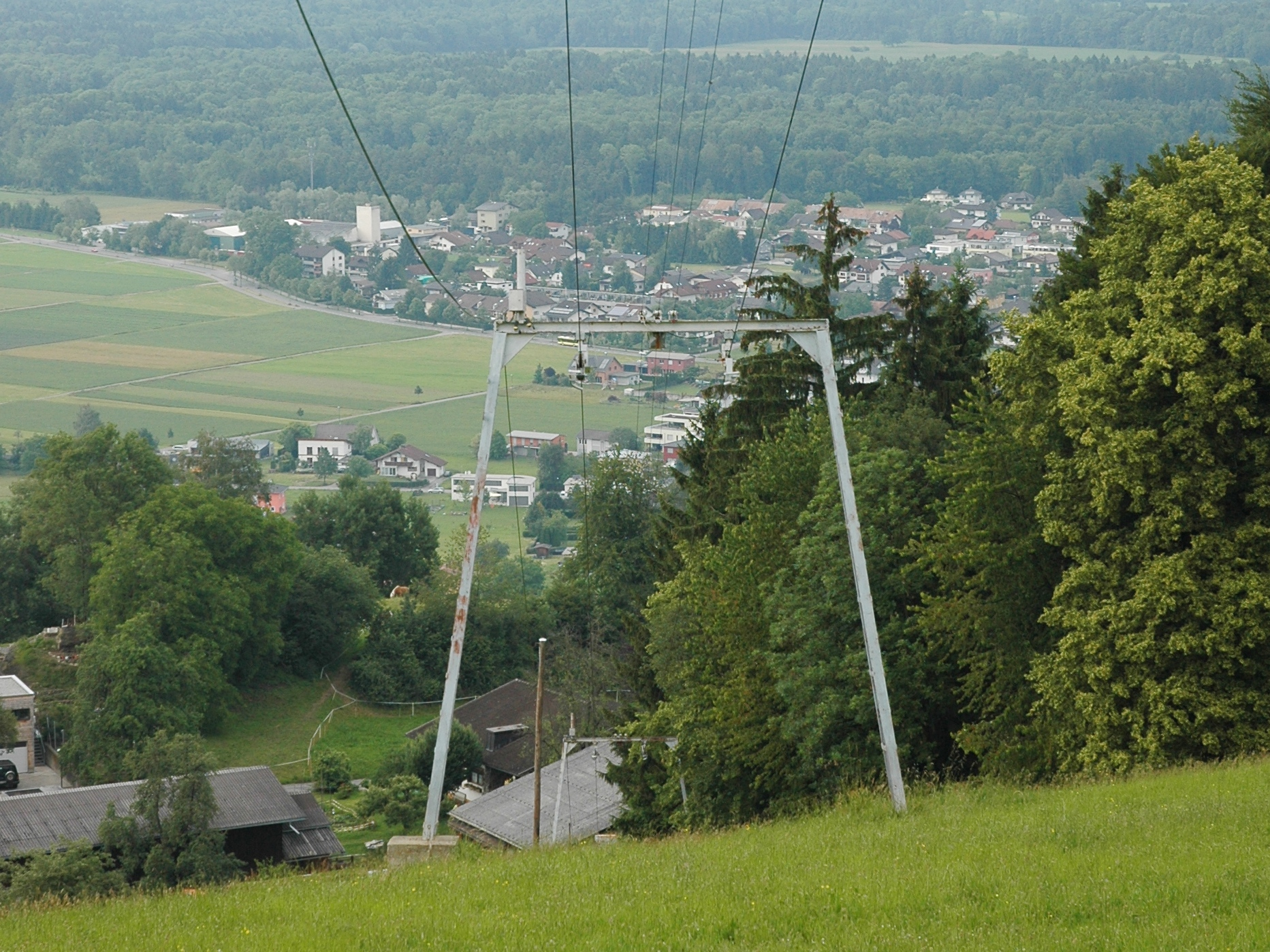 Fresch, Alter Schilift Auf der Egg, Blick über Oberfresch nach Unternofels